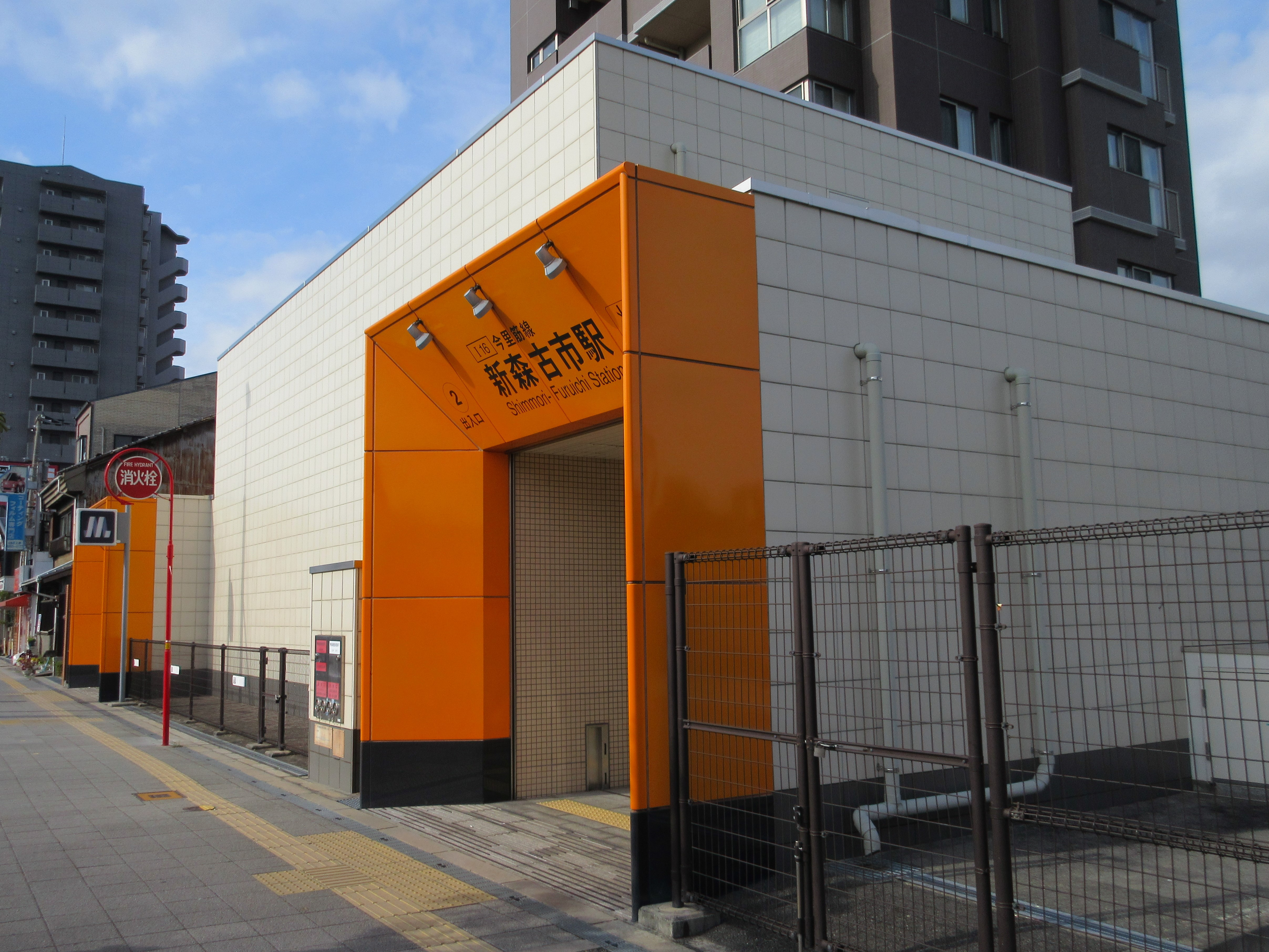 大阪市高速電気軌道（Osaka Metro）新森古市駅